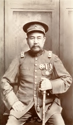 莫栄新 (1853 - 1930)